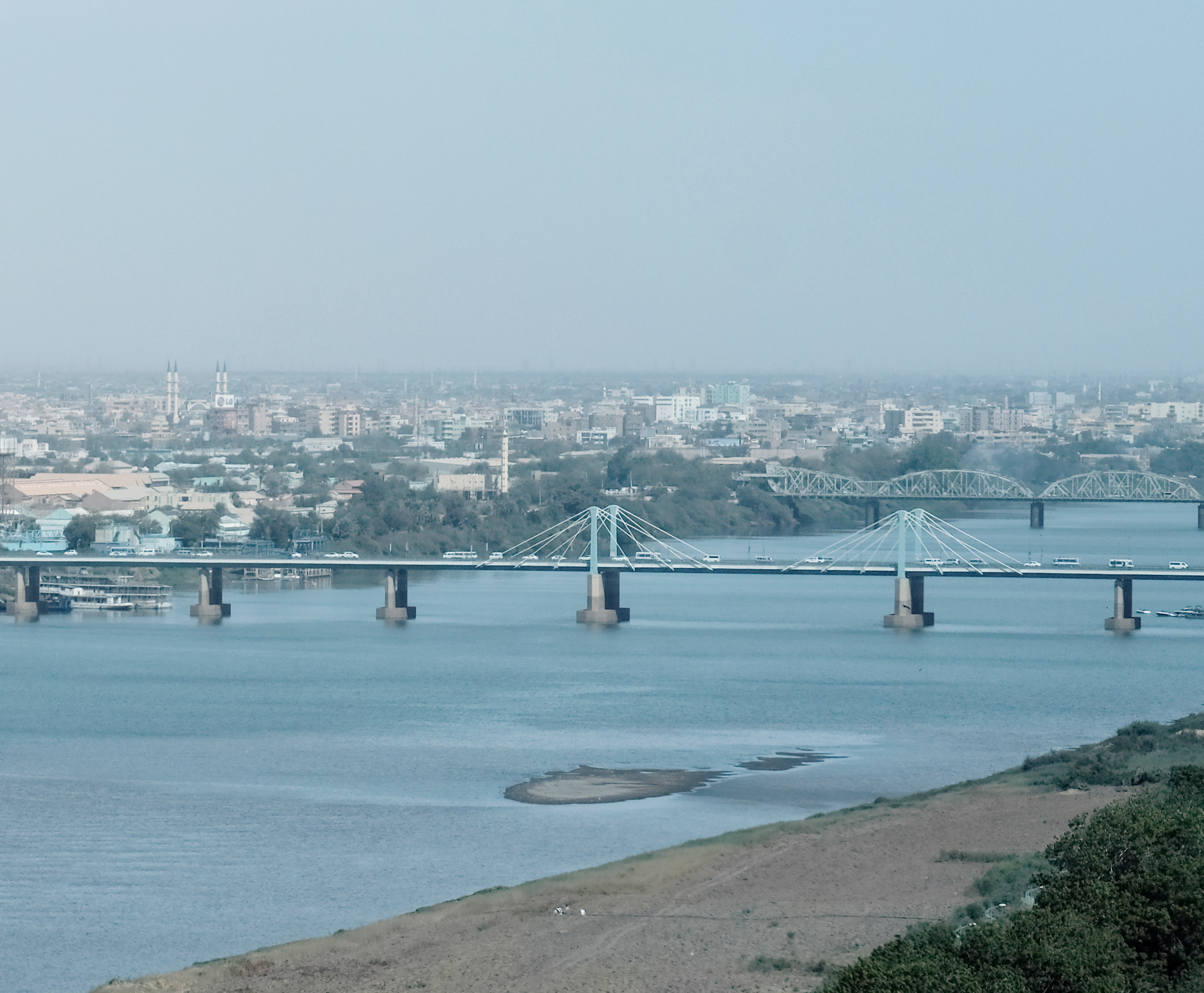 El Mek Nimir Bridge